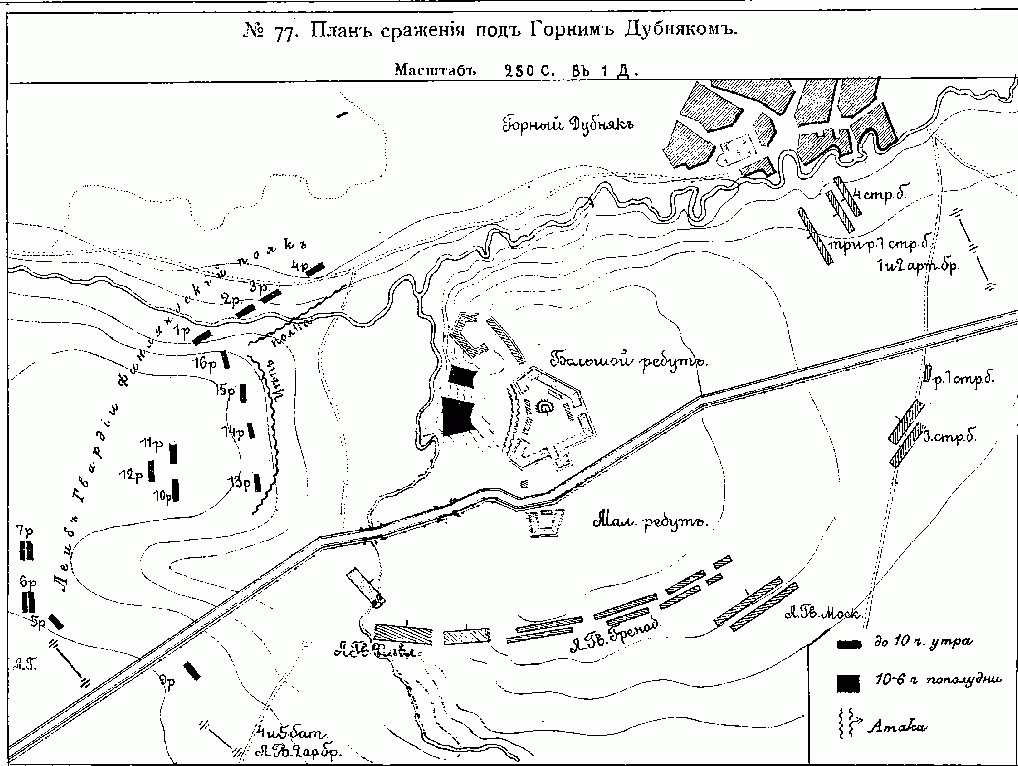 Битка при Горни Дъбник